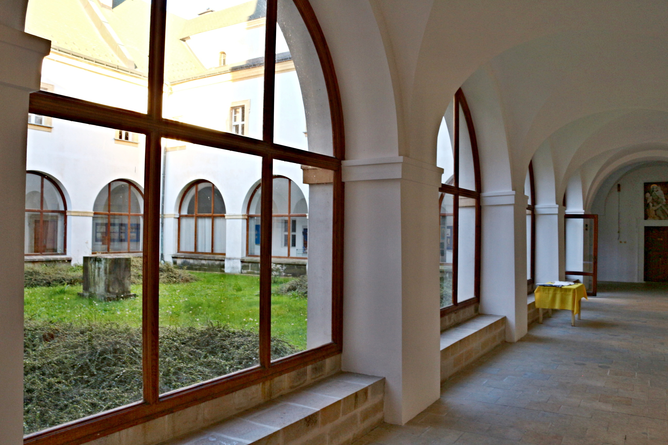 Dominikánský klášter v Jablonném v Podještědí